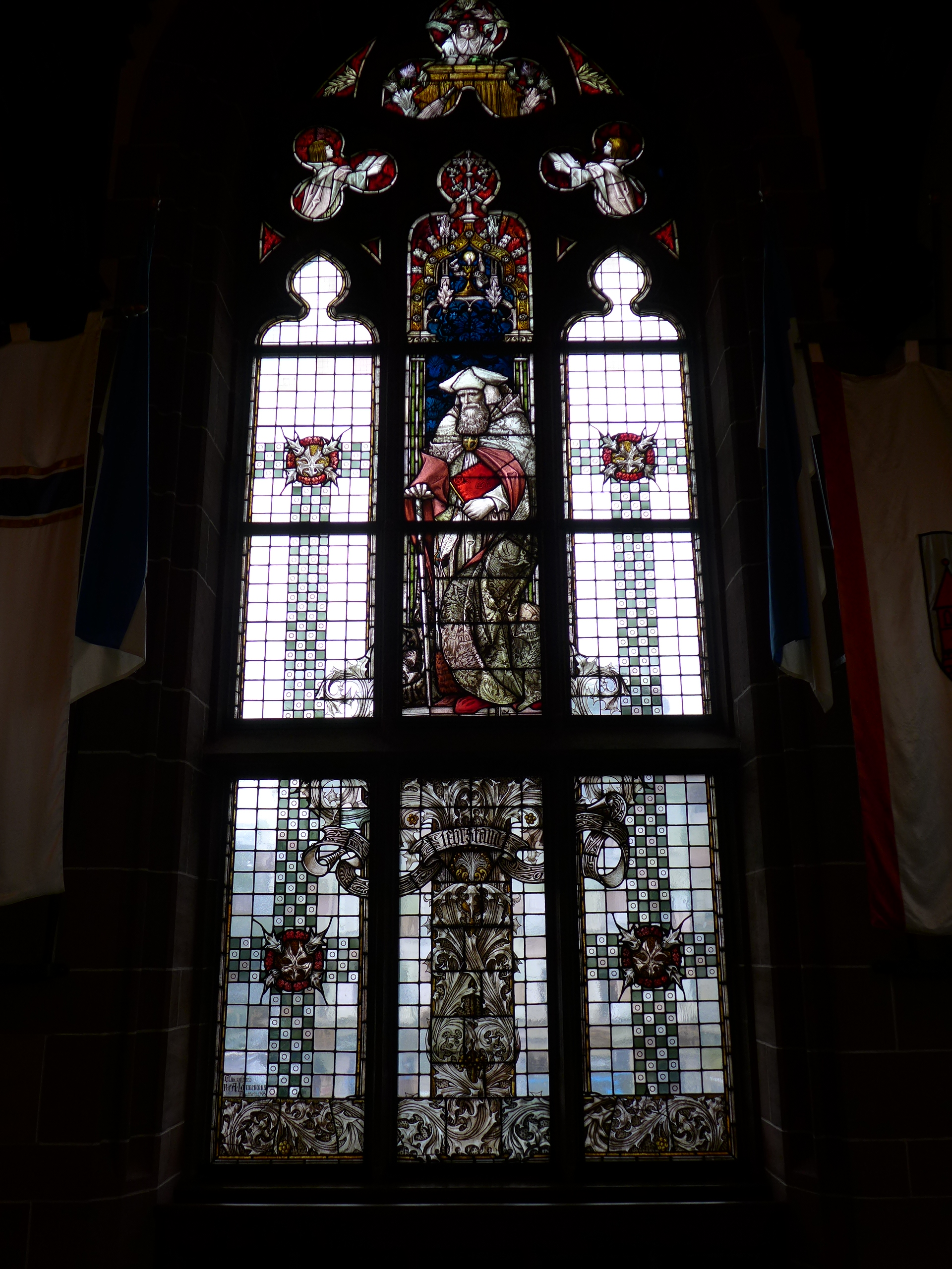 Rathaus St. Johann, Festsaal, Glasgemälde "Lehrstand"